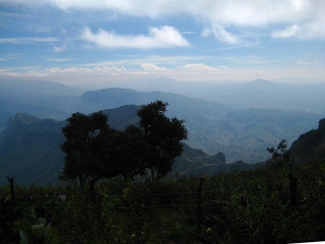 Vista panorámica de la Sierra Gorda de Querétaro, desde el mirador Cuatro Palos. El mirador está a más de 2,700 metros sobre el nivel del mar, en la parte más alta de la Sierra Gorda. Incluye una vista del Cerro de la Media Luna.